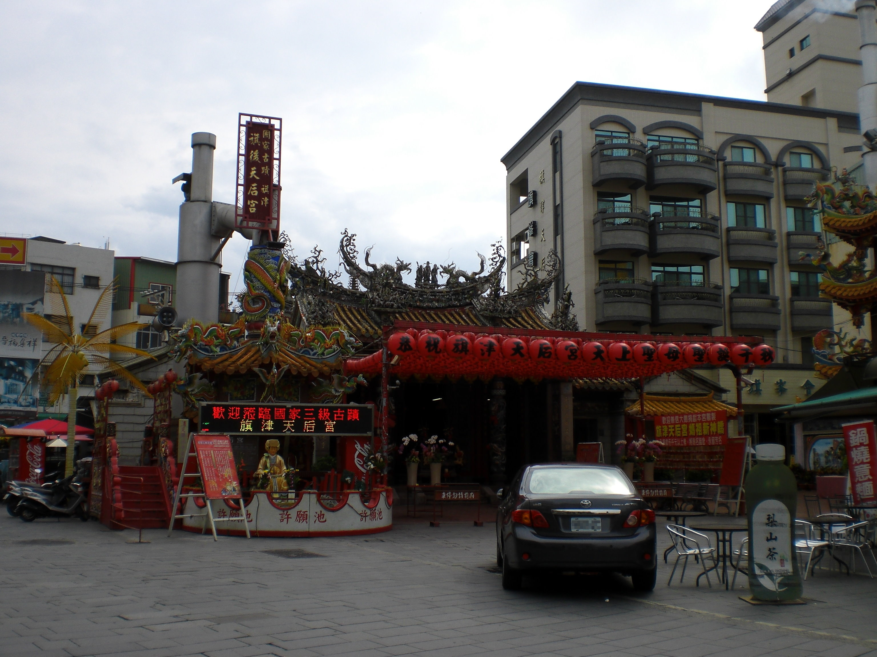 2013年5月17日的旗津天后宮